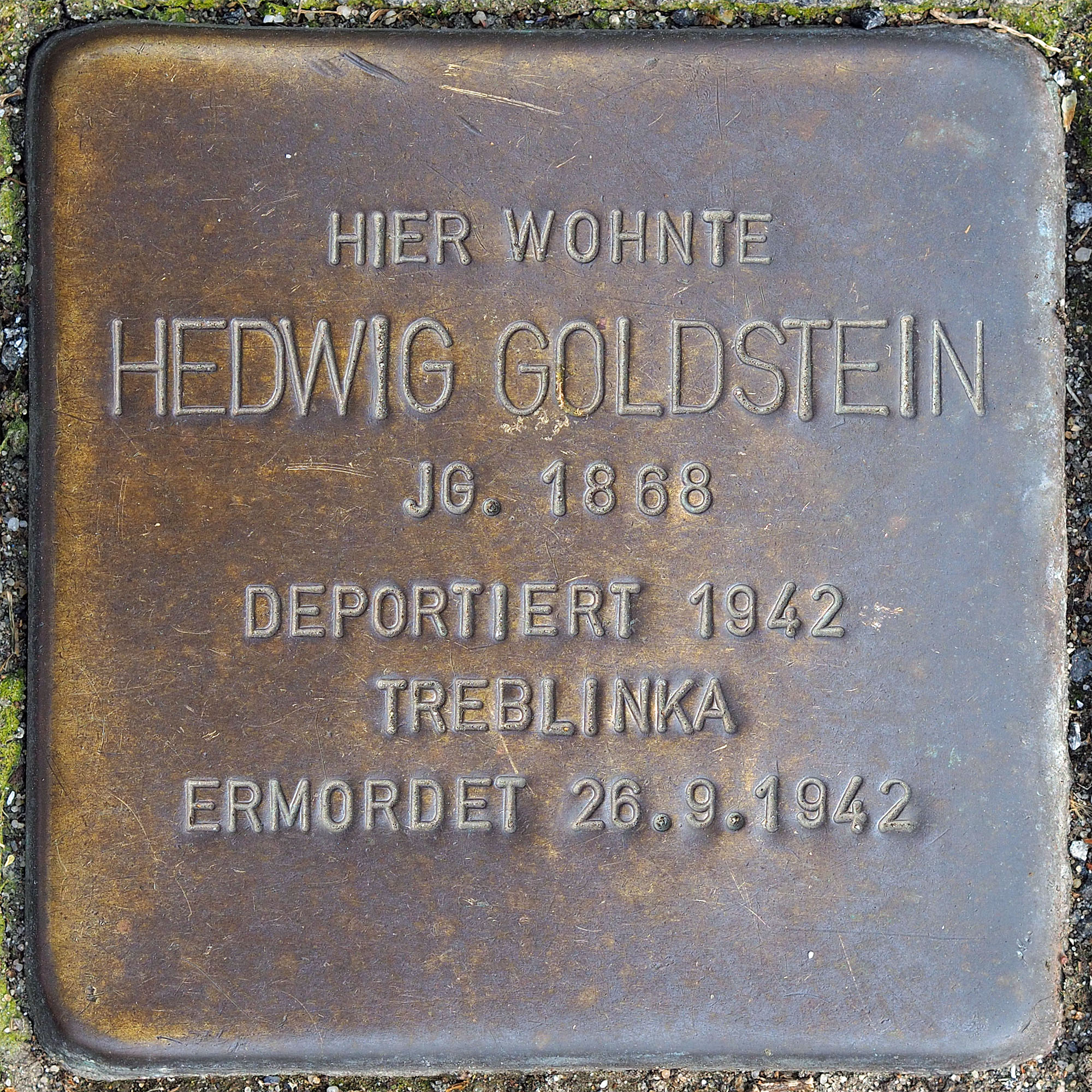 Stolpersteine GV: Goldstein, Hedwig